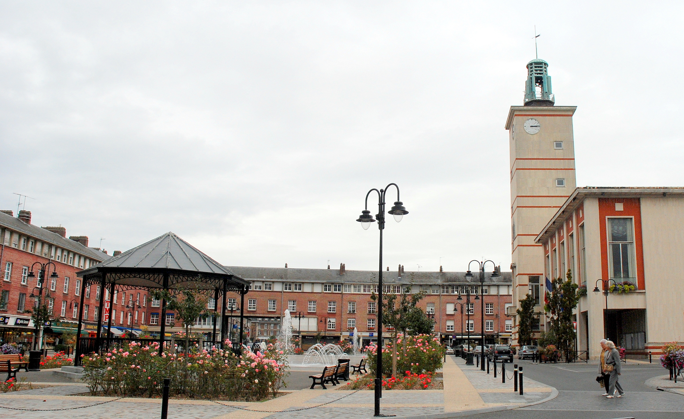 Abbeville (Somme, Picardie, France) - La place de l'Hôtel-de-ville.